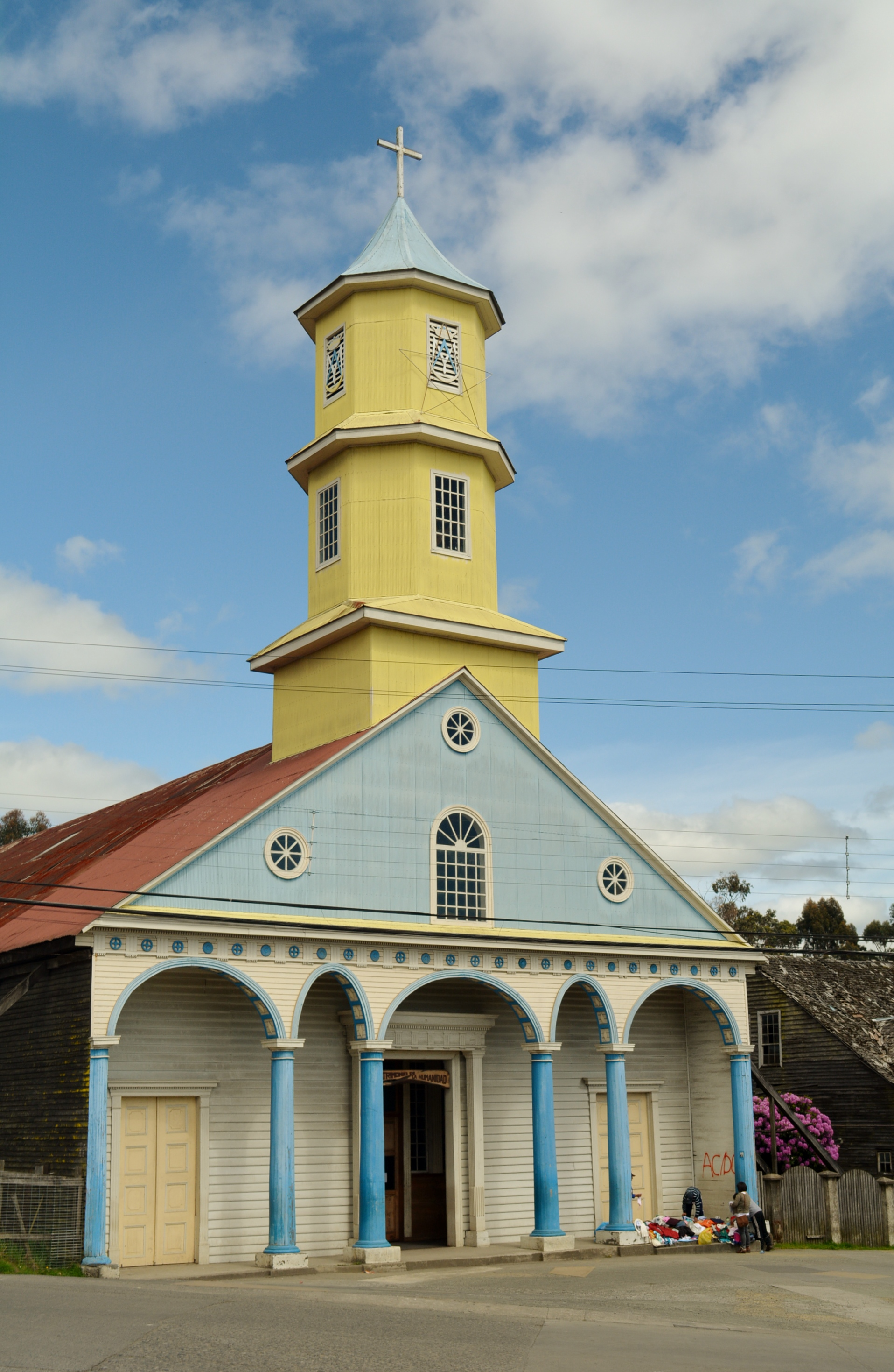 Igresia San Carlos de Borromeo - Chonchi - Chile